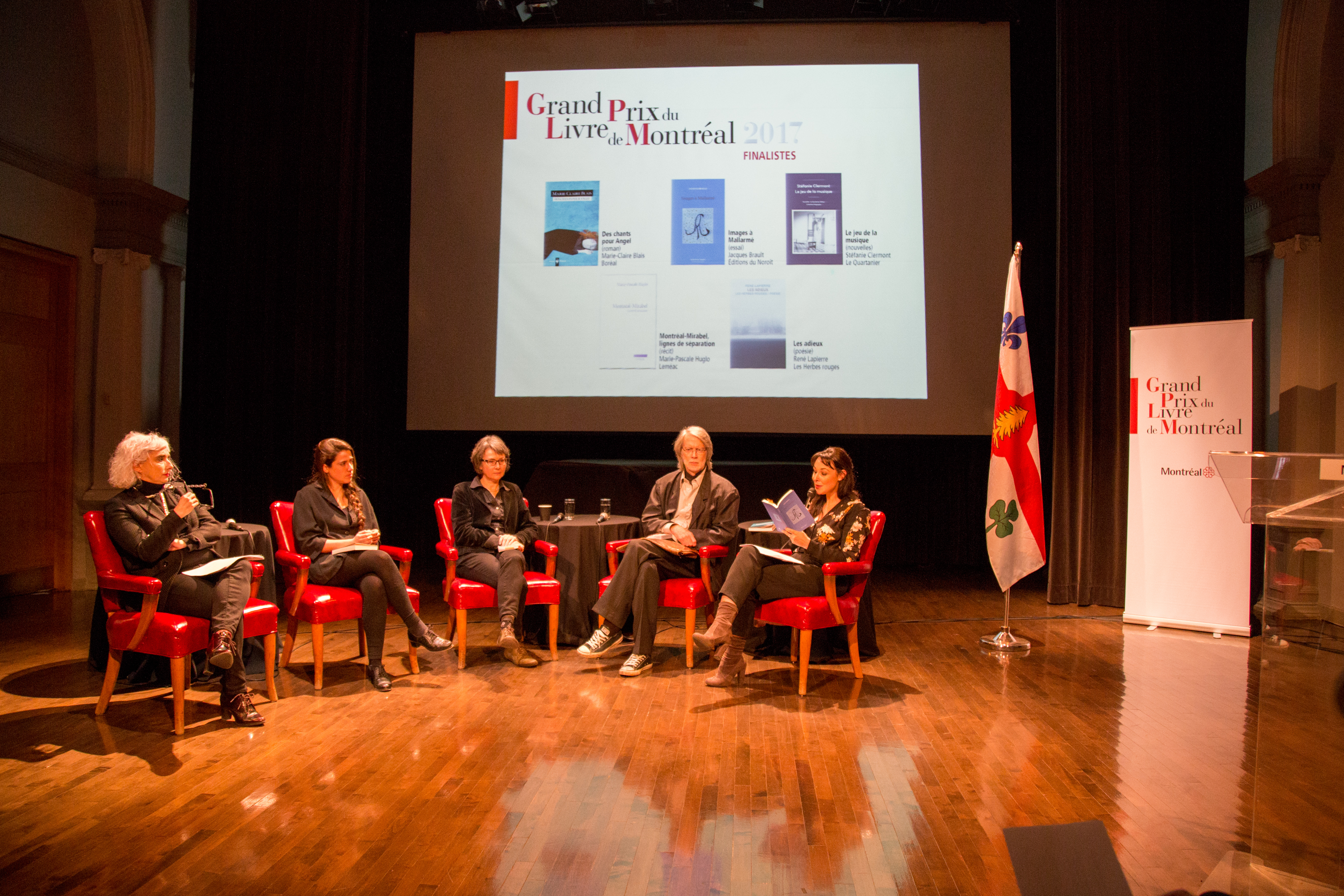 Une partie des finalistes pour le Grand Prix du livre de Montréal 2017. Photo prise lors de la cérémonie de l'annonce du lauréat à la Chapelle historique du Bon-Pasteur, 100, rue Sherbrooke Est à Montréal.